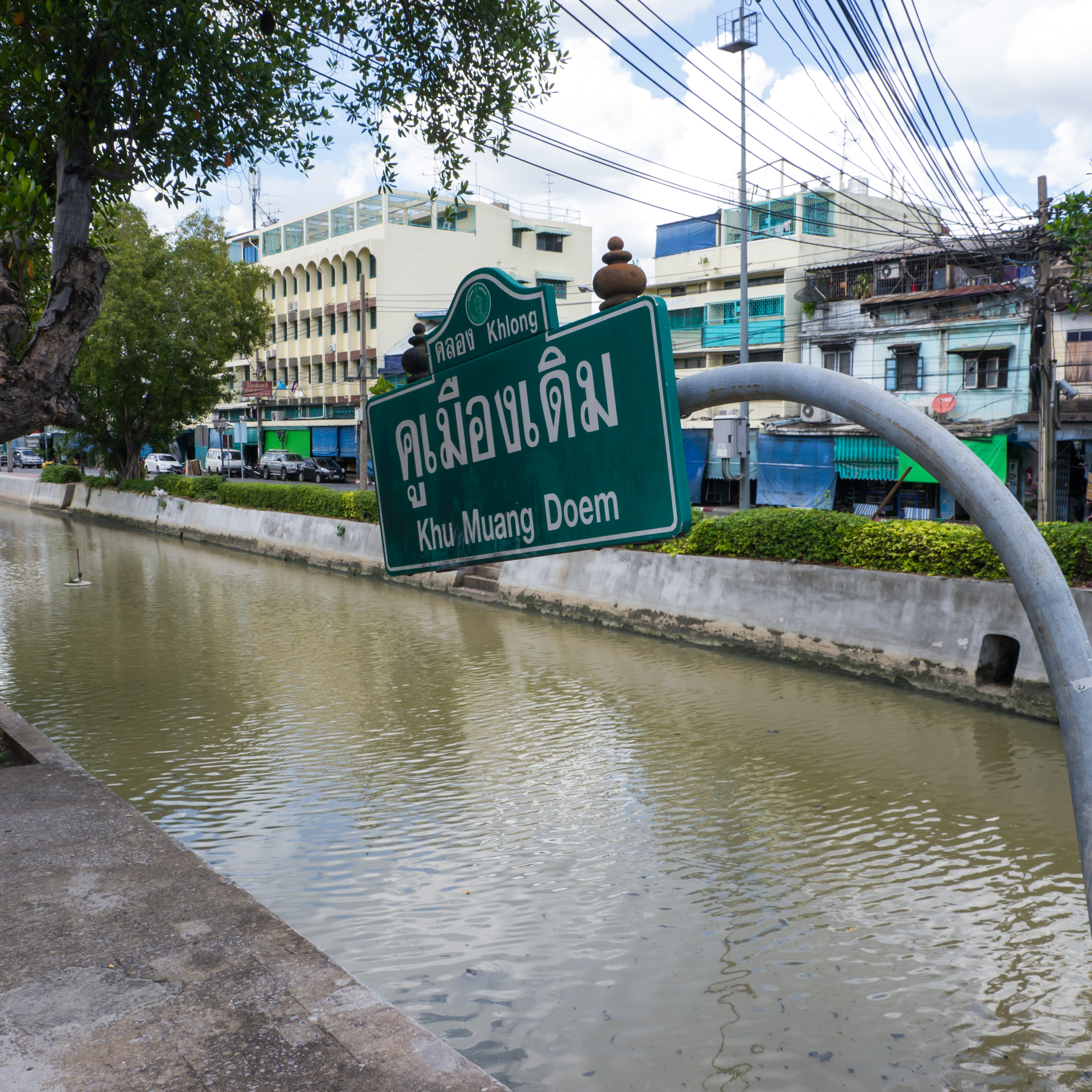 คลองคูเมืองเดิม